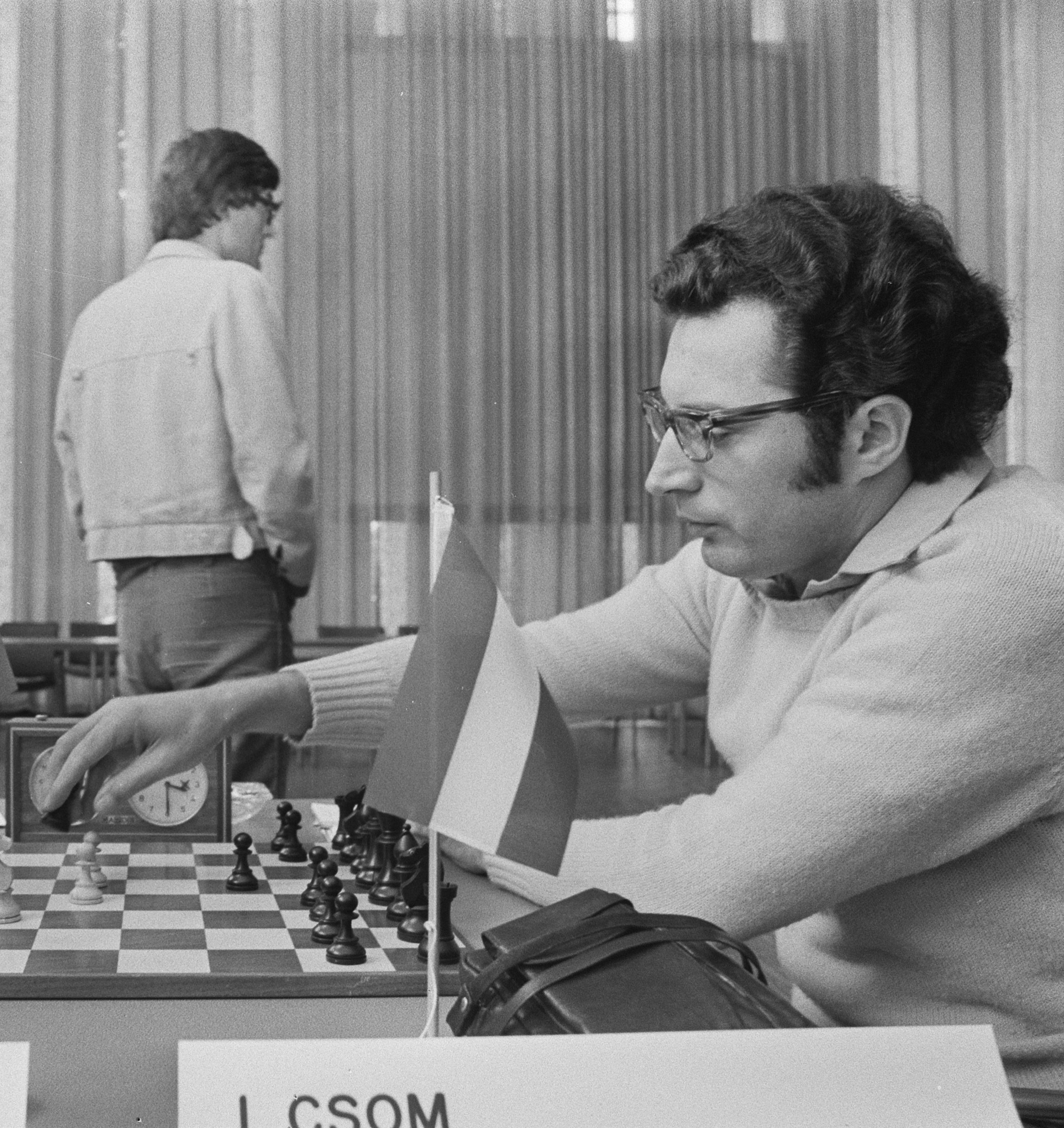 IBM-schaaktoernooi 12e ronde, István Csom.